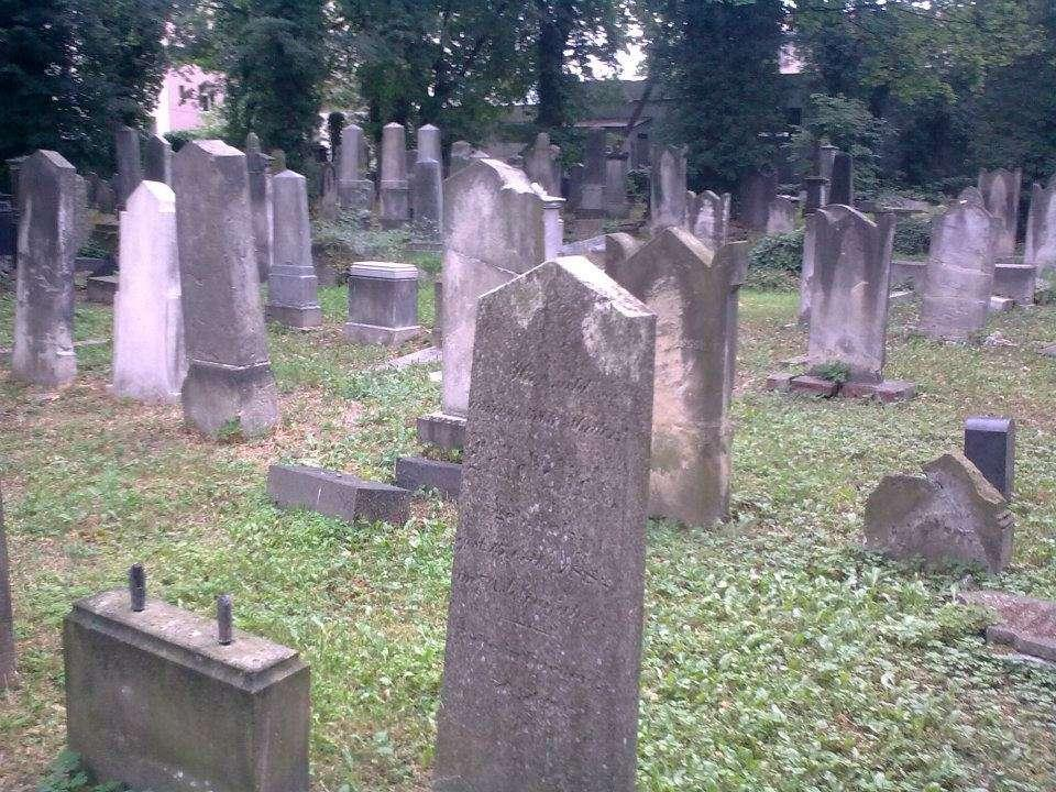 Macewy na cmentarzu żydowskim w Opolu